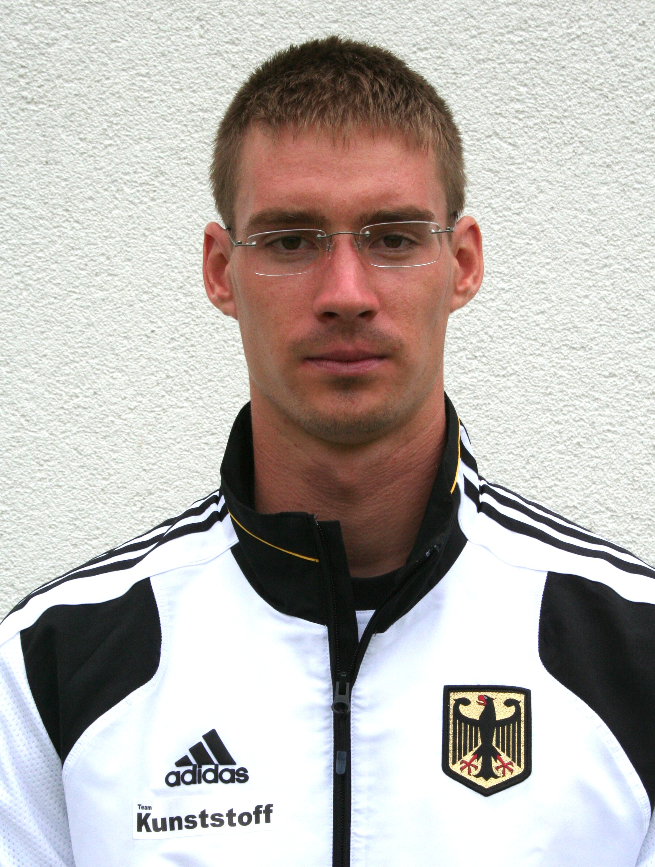 Deutscher Kanu-Rennsportler und Europameister im Vierer Kajak über 1.000m im Jahr 2010